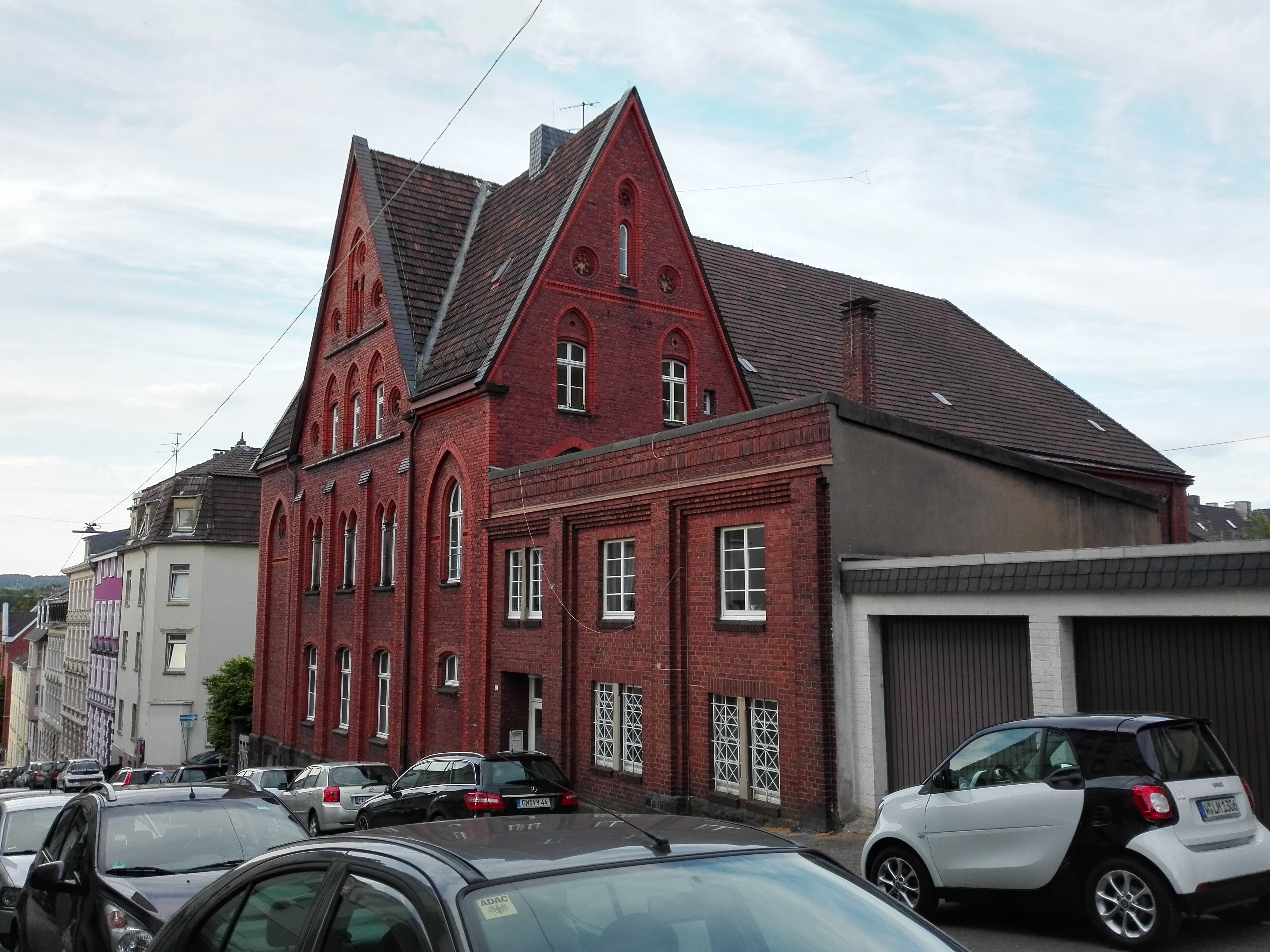 Ansichten des alten Kirchsaals Ackerstraße in Wuppertal-Heckinghausen